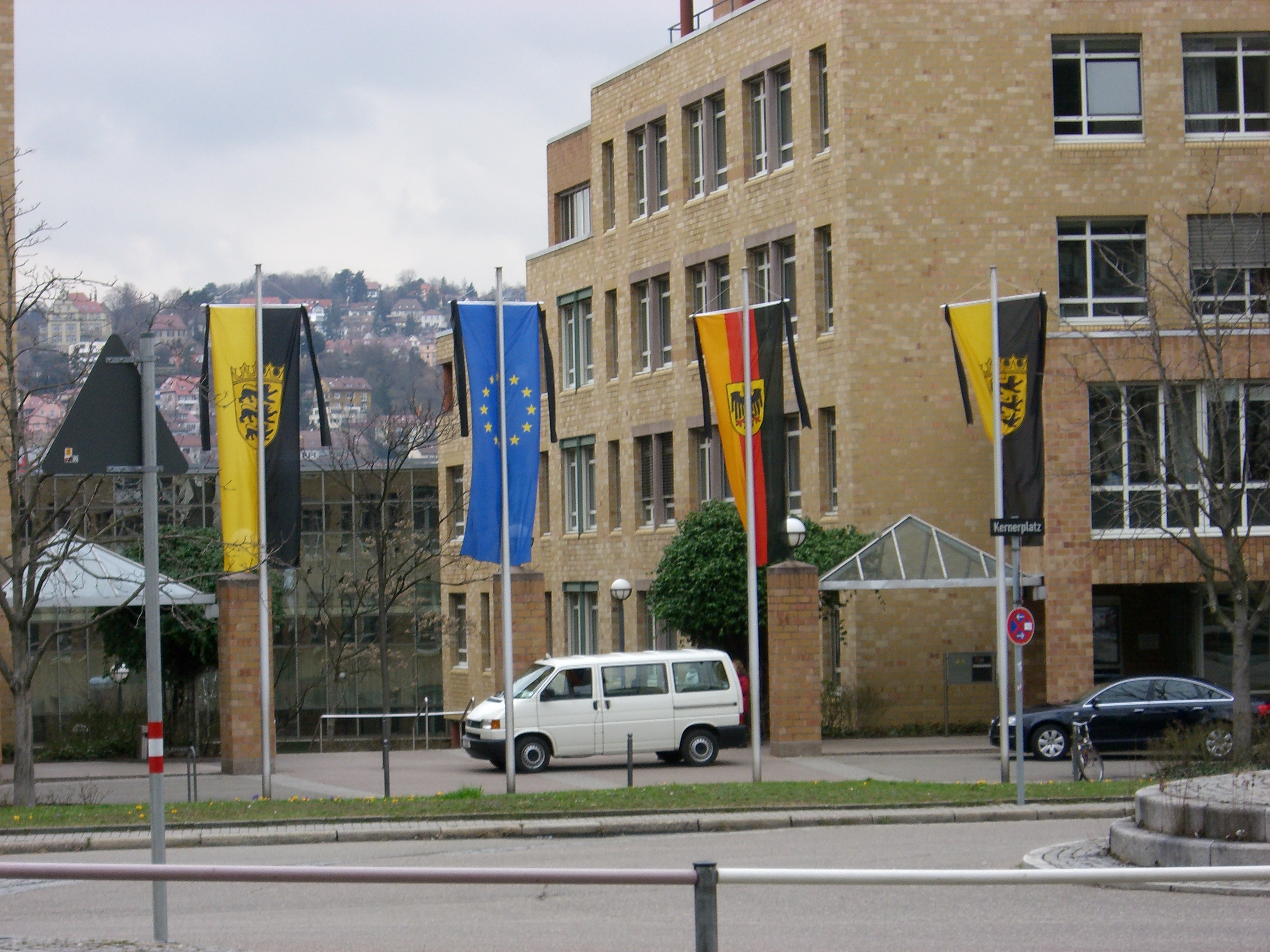 Staatstrauer in Stuttgart nach dem Amoklauf in Winnenden. Ministerien am Kernerplatz